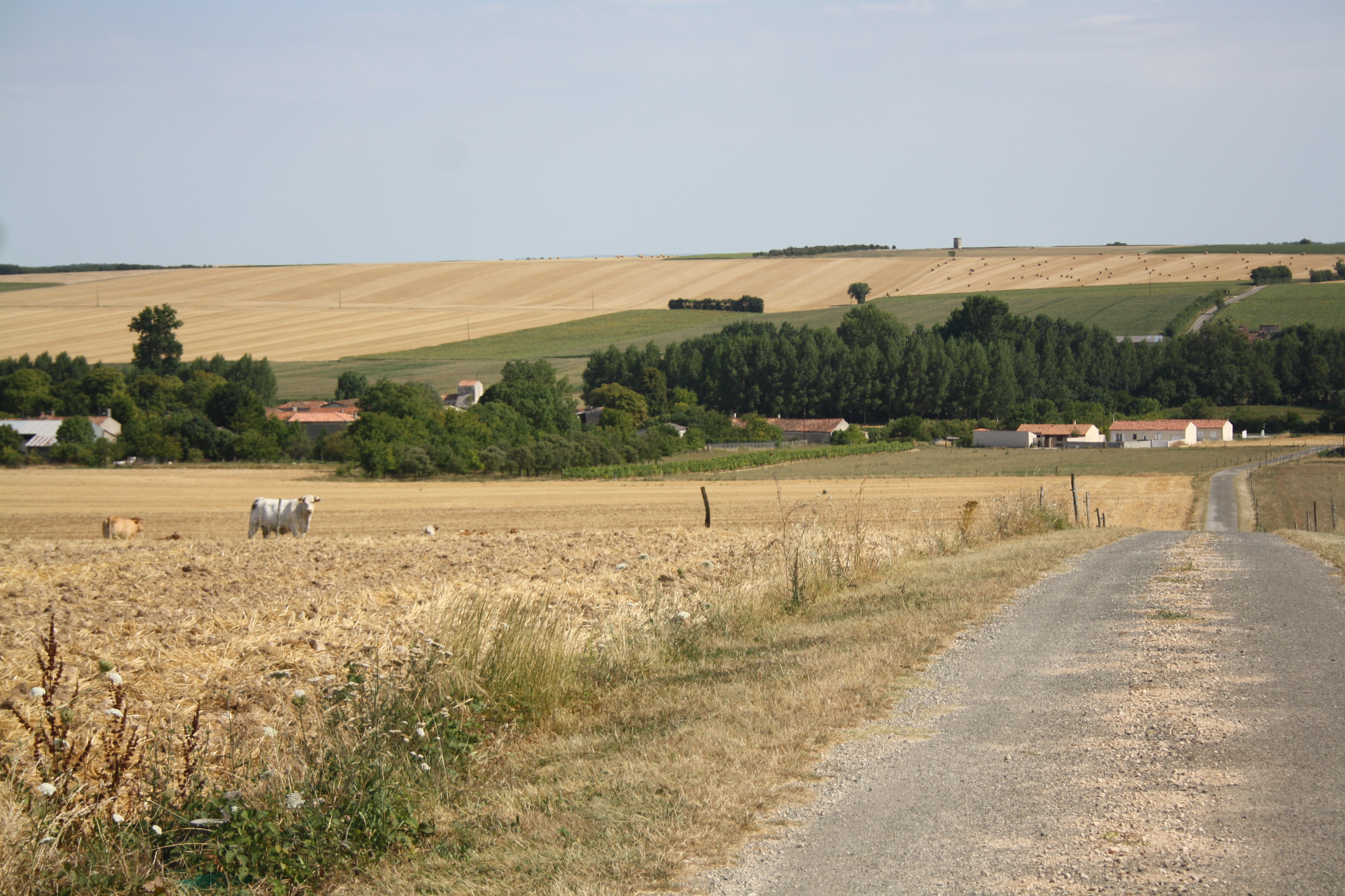 Pâturage, Saint-Pierre-de-Juillers.